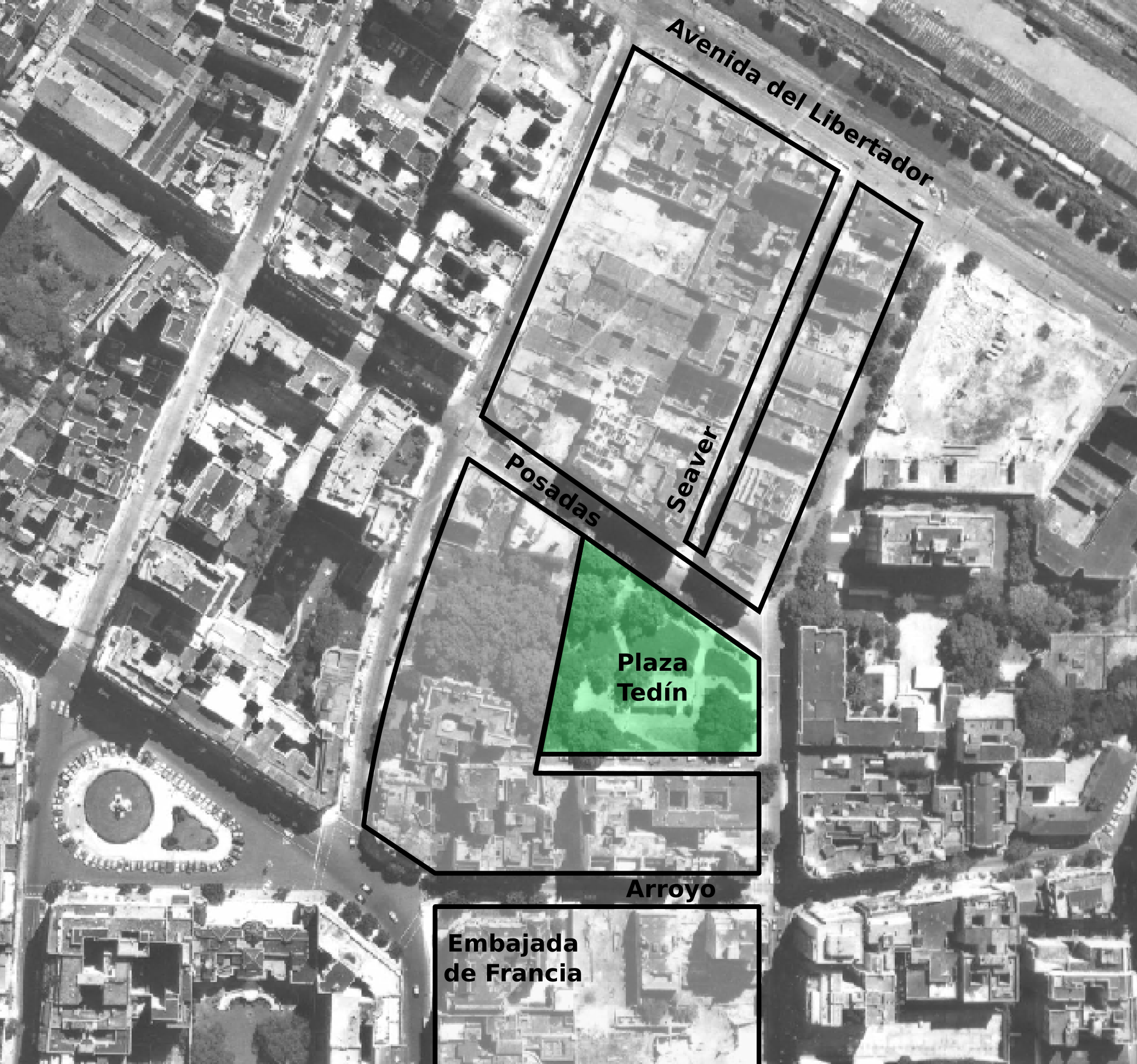 Vista satelital de Retiro, Ciudad de Buenos Aires.